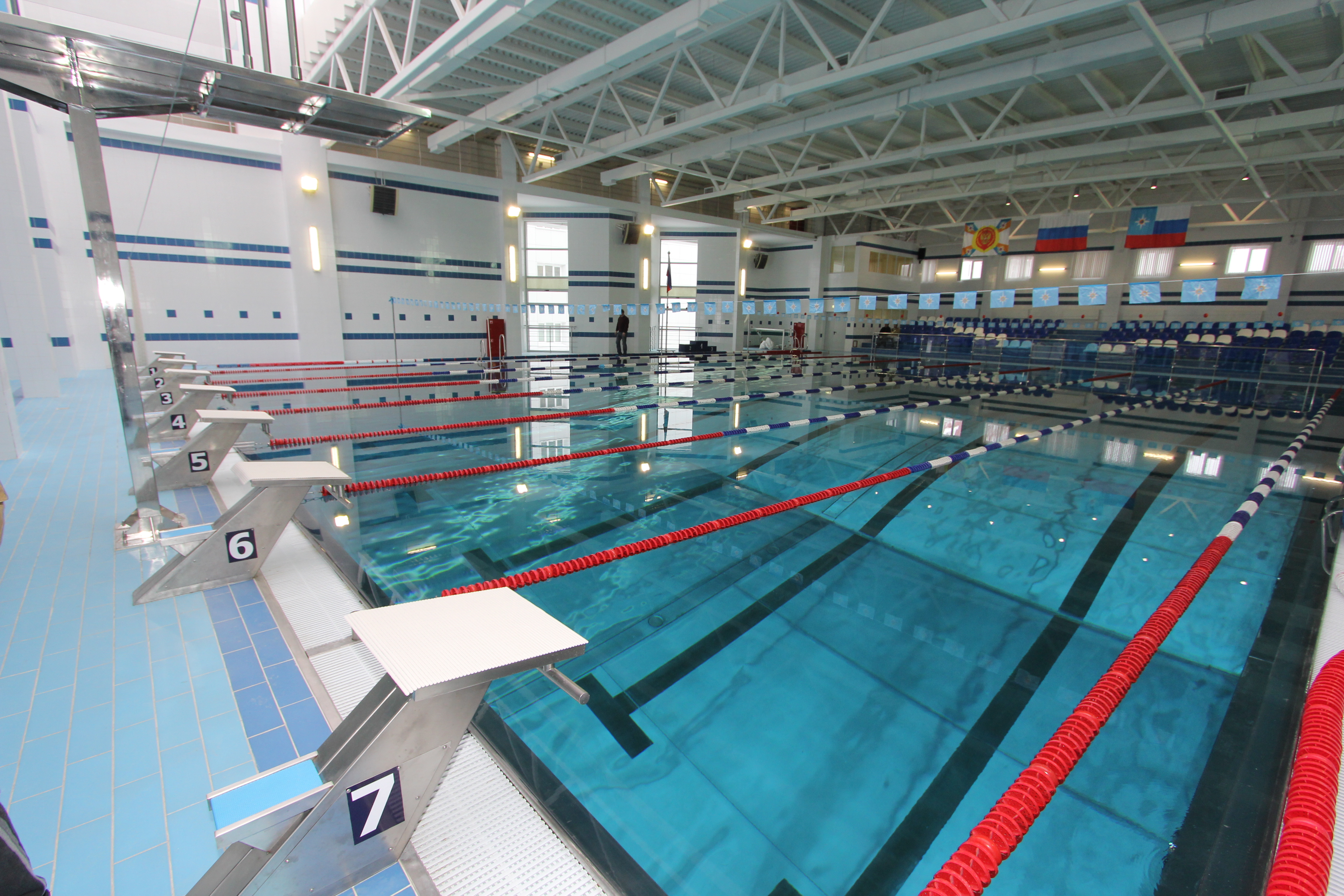 Бассейн АГЗ